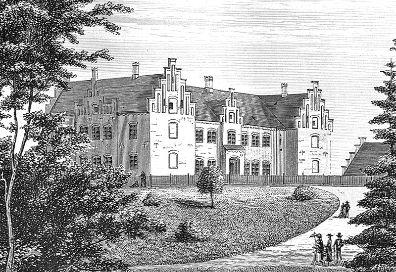 Erholm er dannet i 1500 af Claus Eriksen Ravensberg. Erholm ligger i Rørup Sogn, Vends Herred, Aarup Kommune. Hovedbygningen er opført i 1850-1854 .